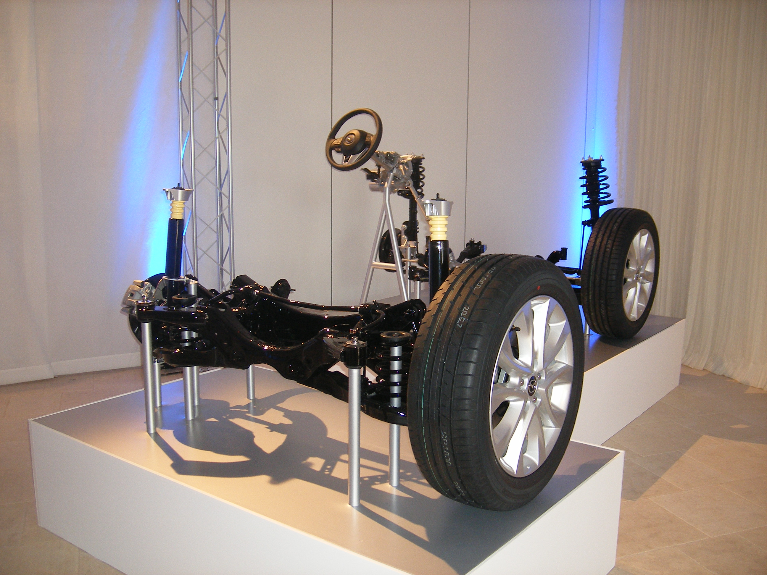 Plataforma Skyactiv para automóvil: rígida, ligera y con avanzada tecnología en transmisiones.